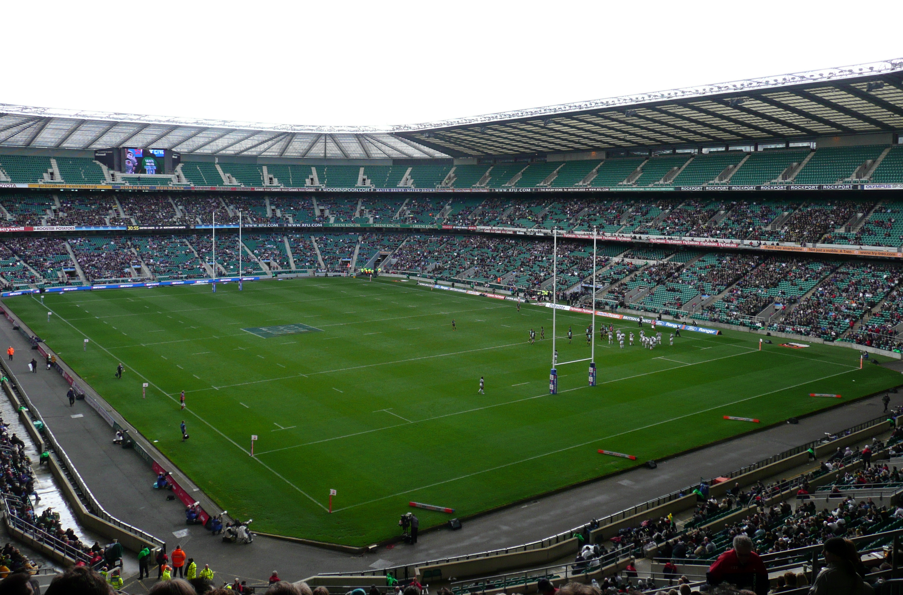 Twickenham Stadium. Leicester Tigers-Osprey 12 avril 2008 Edf Cup Final